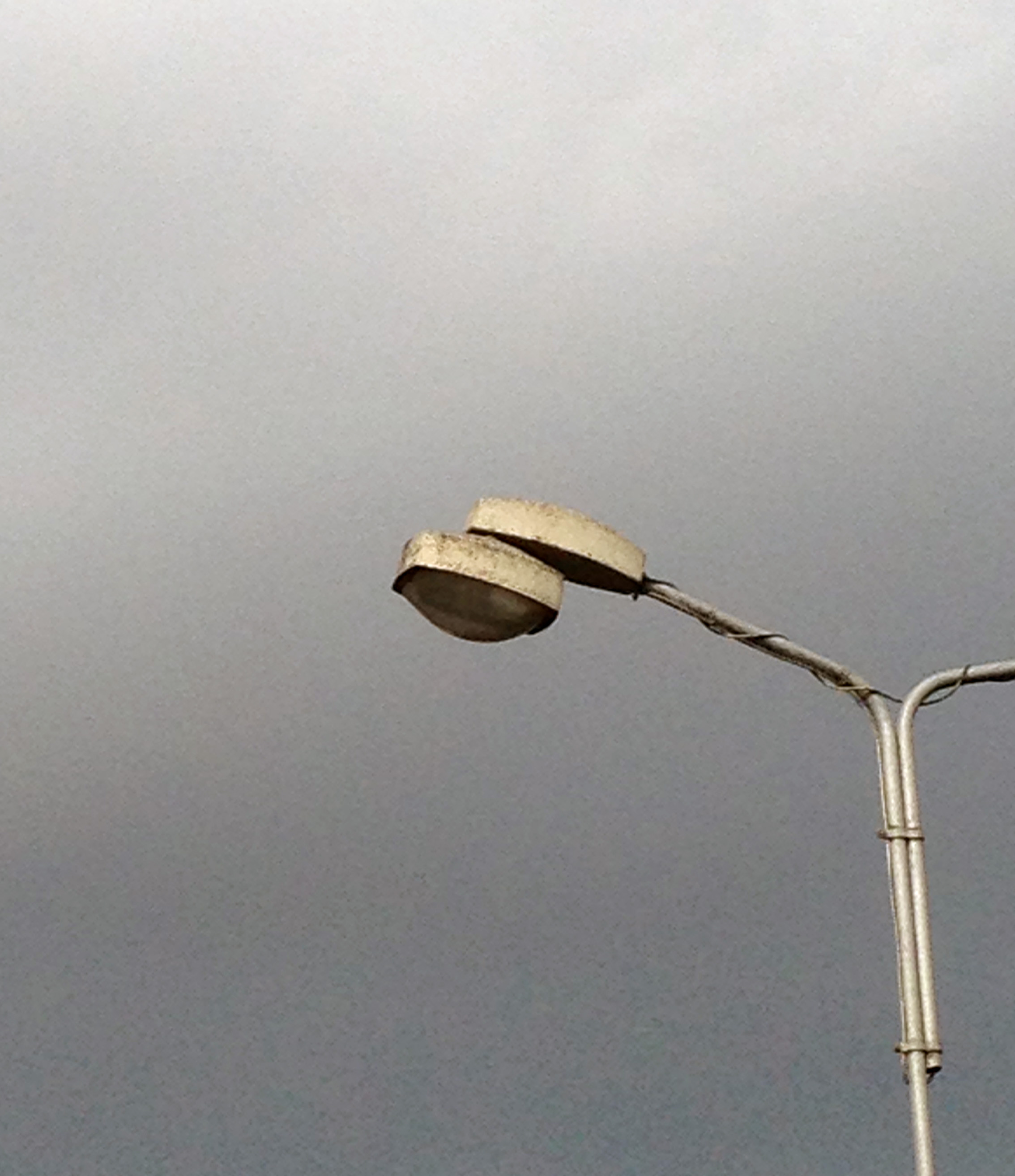 ჩეხოსლოვაკიური ლამპიონის სანათი Electrosvit Ambasador ჩეხეთის ქ. ნოვე-მნესტო-ნად-მეტუიში